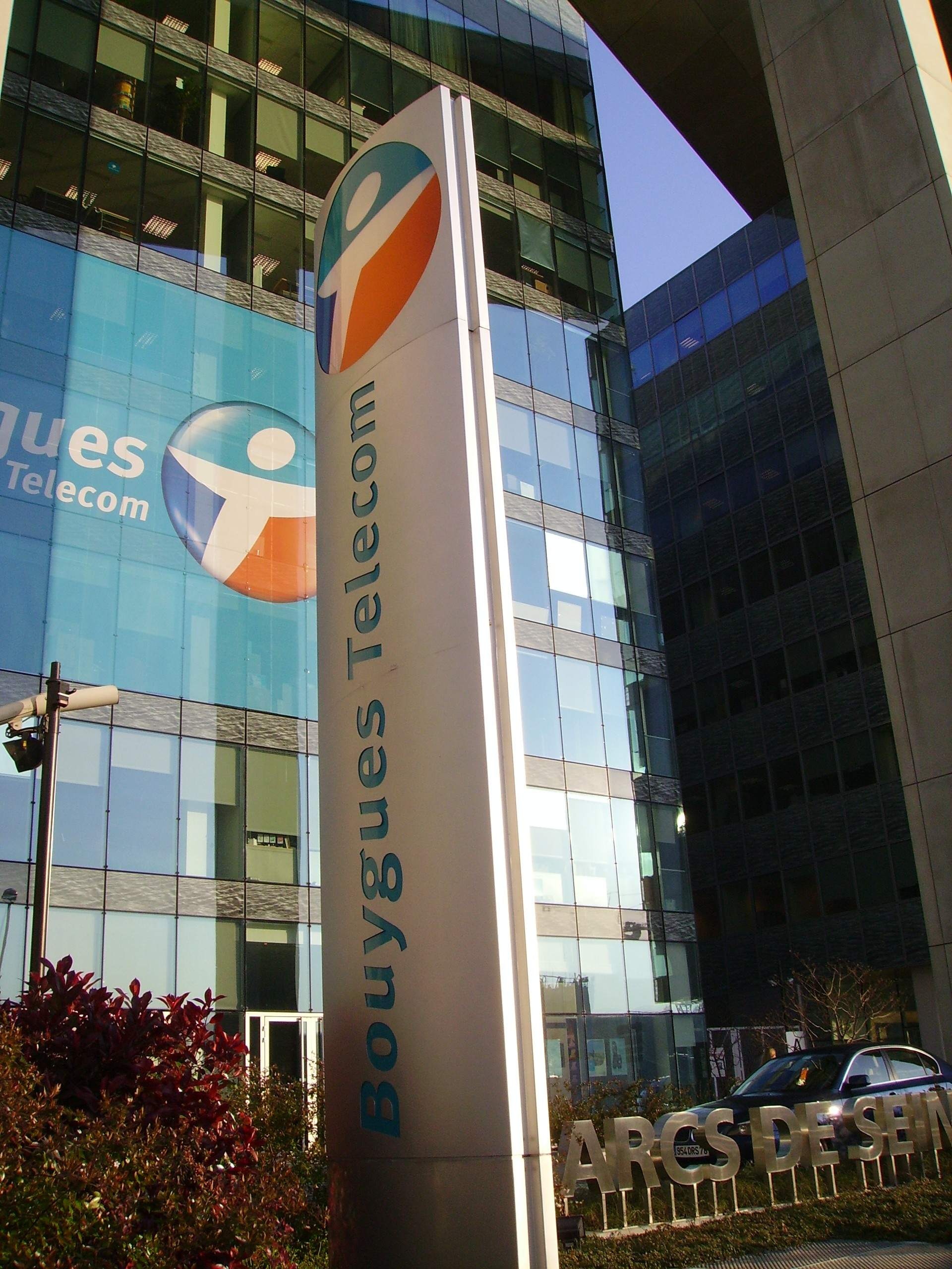 Siège social de Bouygues Telecom aux Arcs de Seine à Boulogne-Billancourt, France